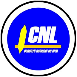 Logotipu del Conceyu Nacional de Liriu